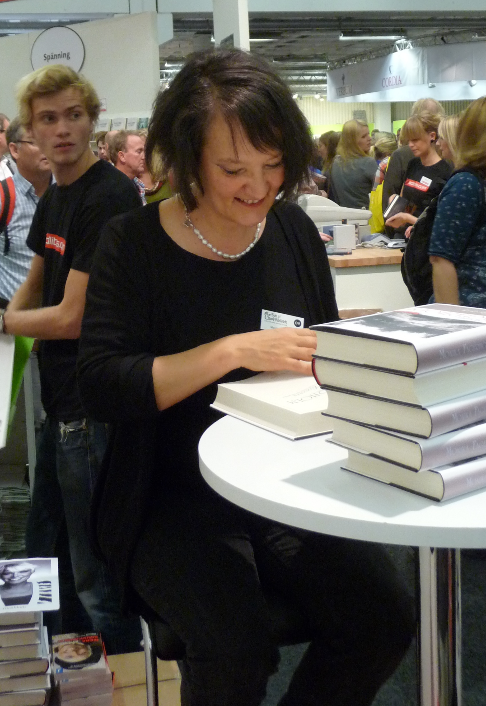 Monica Fagerholm på bokmässan i Göteborg 2009.